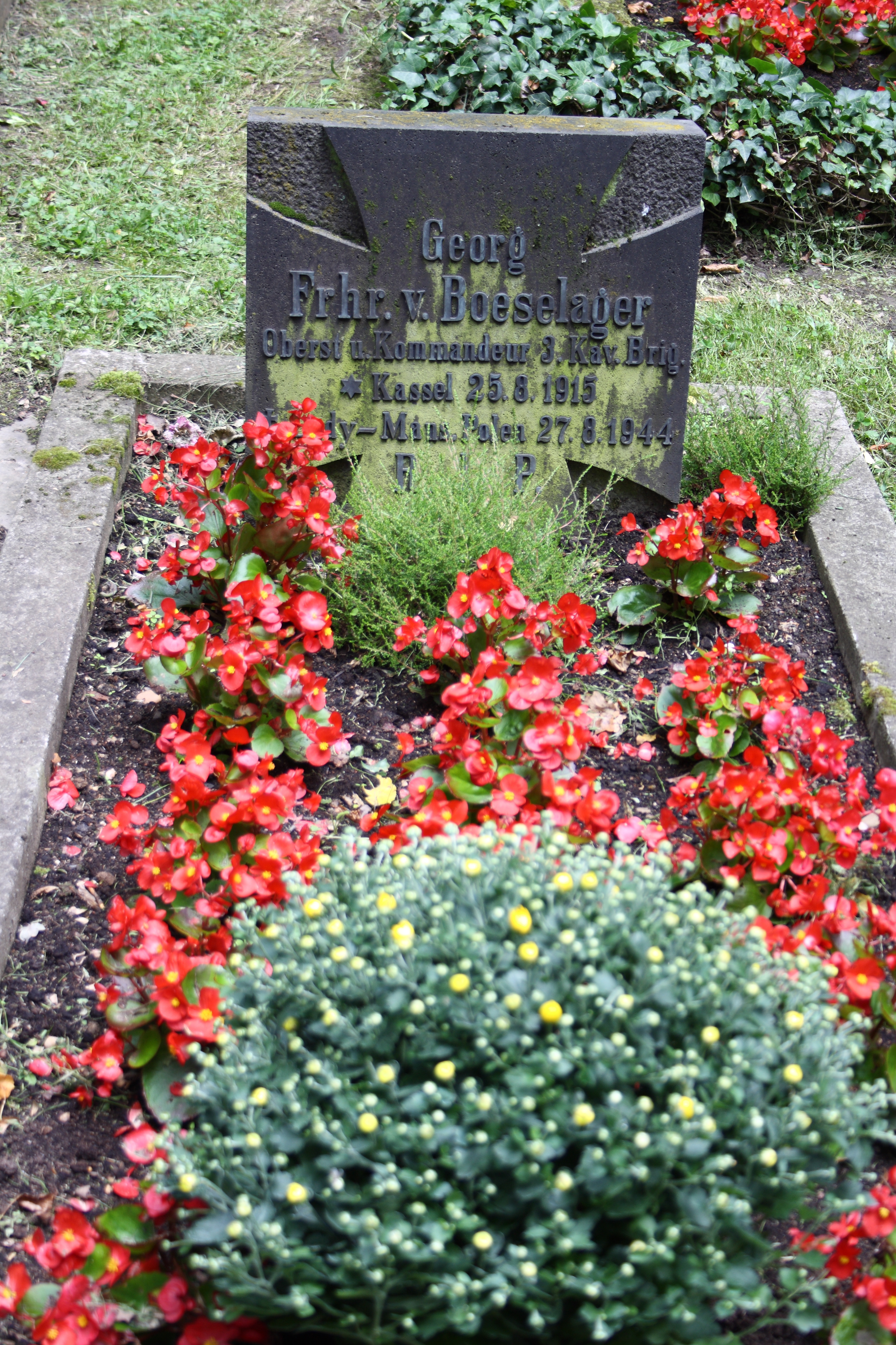 Burg Heimerzheim in Heimerzheim, einem Ortsteil von Swisttal im Rhein-Sieg-Kreis